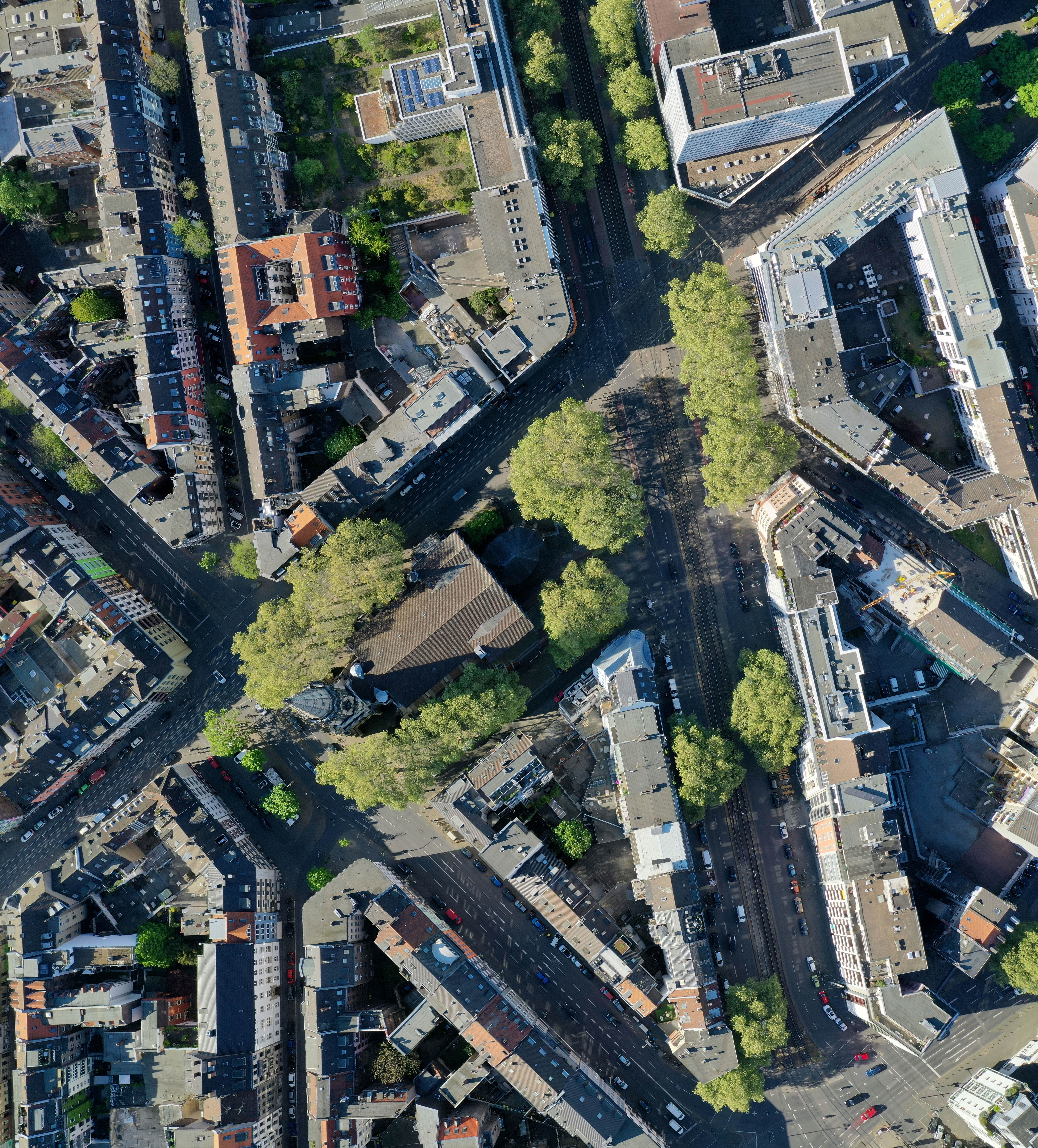 Der Zülpicher Platz ist ein zentraler, jedoch relativ kleiner Platz an den Kölner Ringen. Diese Aufnahme bestand ursprünglich aus 8 Einzelbildern und hat ungefähr Nord-Süd-Ausrichtung. Die breite Straße rechts der Herz Jesu Kirche ist Teil des Ringe-Systems von Köln, hier der Hohenstaufenring. Die diagonal von oben rechts nach unten links verlaufende Straße ist die Jahnstraße, die nach dem kleinen Stück an der Kirche vorbei Zülpicher Platz und anschließend Zülpicher Straße heißt. Diese schneidet senkrecht, von links oben nach Mitte unten, die Roonstraße. Die Genehmigugen für diesen außergewöhnlich hohen Flug kamen von der Deutschen Flugsicherung, der Bezirksregierung und der Stadt Köln.